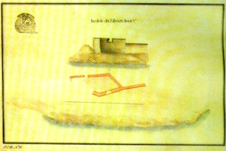 "Reduto da Ribeira Seca", s/d, autor desconhecido, Arquivo Histórico Militar, Lisboa. in MARTINS, José Salgado, "Património Edificado da Ilha Terceira: o Passado e o Presente". Separata da "Atlântida", vol. LII, 2007. p. 38. Também integrante da "Colecção de Plantas e Alçados de 32 Fortalezas dos Açores, por Joze Rodrigo d'Almeida em 1830", José Rodrigo de Almeida, 1830 (c.) GEAEM (346-1-8A-96), Lisboa, Portugal.